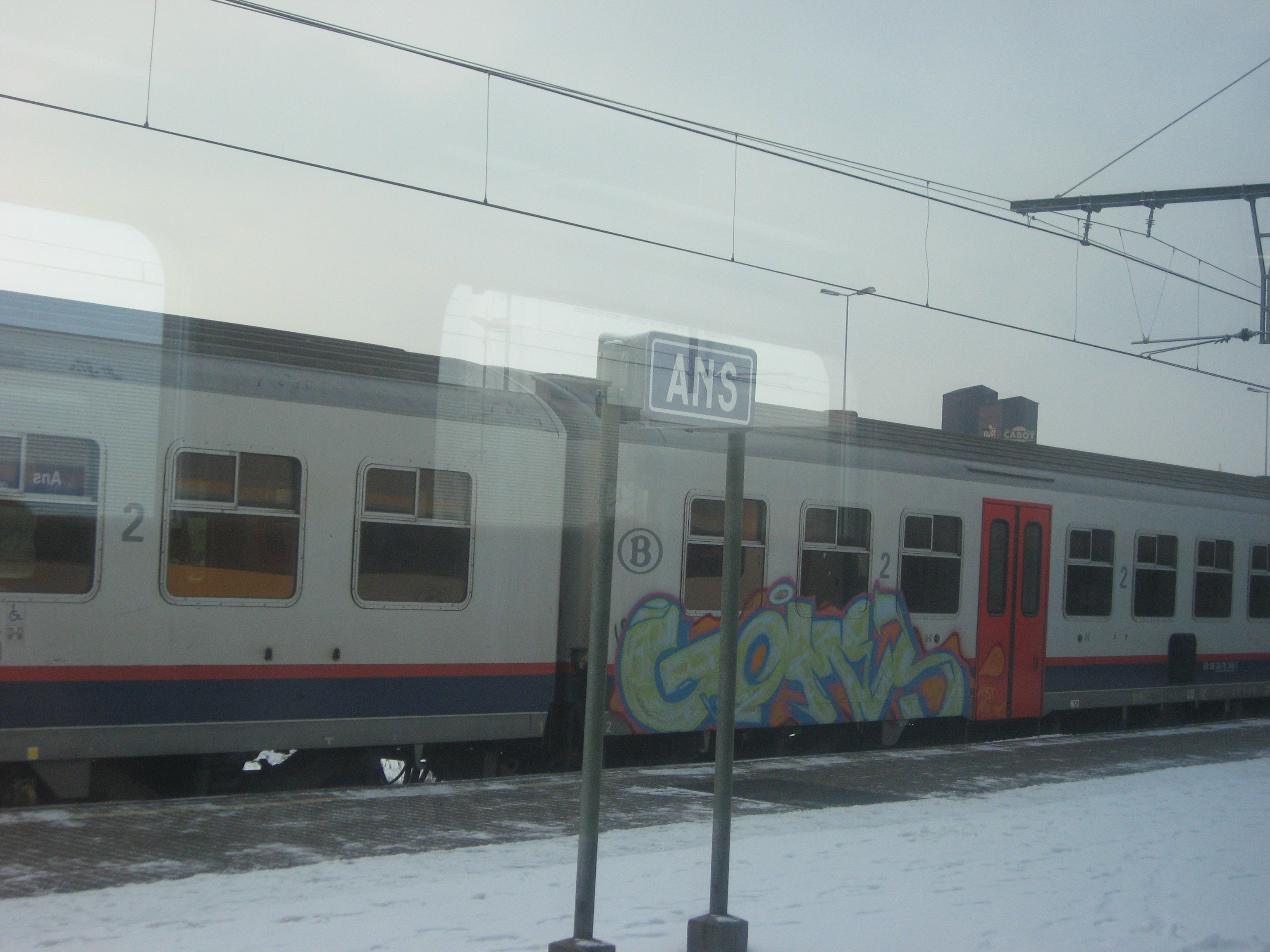 gare de Ans près de Liège, Wallonie, Belgique.